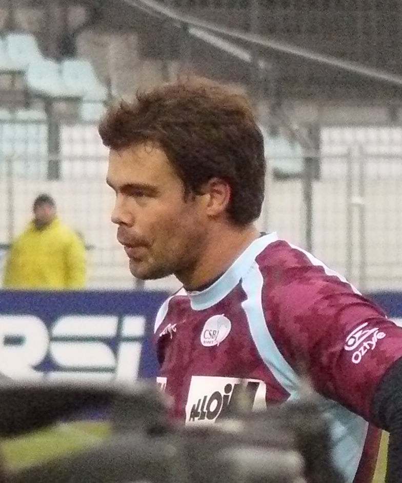 Rudy Coetzee, Date de naissance : 16/04/1981 à Port Elizabeth (Afrique du Sud) Poste : 3/4 Centre Mensuration : 1m95 - 100 kg Clubs précédents : Cats (Super 14, Af. du Sud), Blue Bulls (Super 14, Af. du Sud) Date d'arrivée a : 2006 Rudi Coetzee, lors du match contre le Racing Métro 92, le 3 janvier 2010 à Colombes.